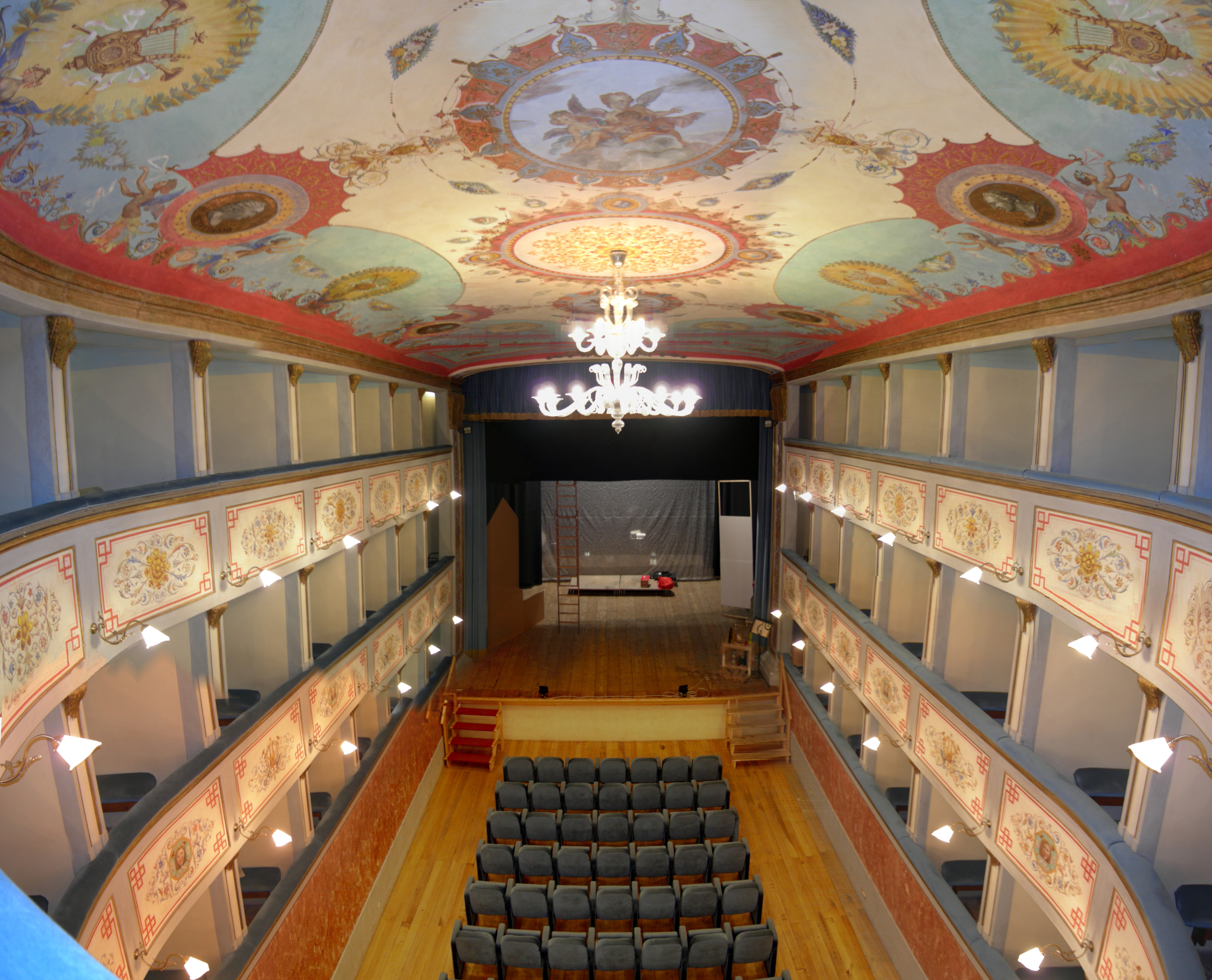 Foto del teatro Luigi Mercantini di Ripatransone. Autore : Marco Capriotti